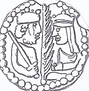 I forbindelse med kong Valdemar den Stores og dronning Sophies bryllup i 1157 blev der fremstillet en række små brakteater med billeder af parret. Fire forskellige motivtyper i alt findes disse brakteater fremstillet med. Der er næppe tale om portrætlighed, men det er første gang at en dansk konge og en dansk dronning afbildedes sammen på noget der kunne kaldes for en "erindringsmønt".